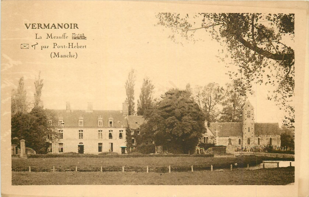 Eglise et manoir à La Meauffe avant 1944.